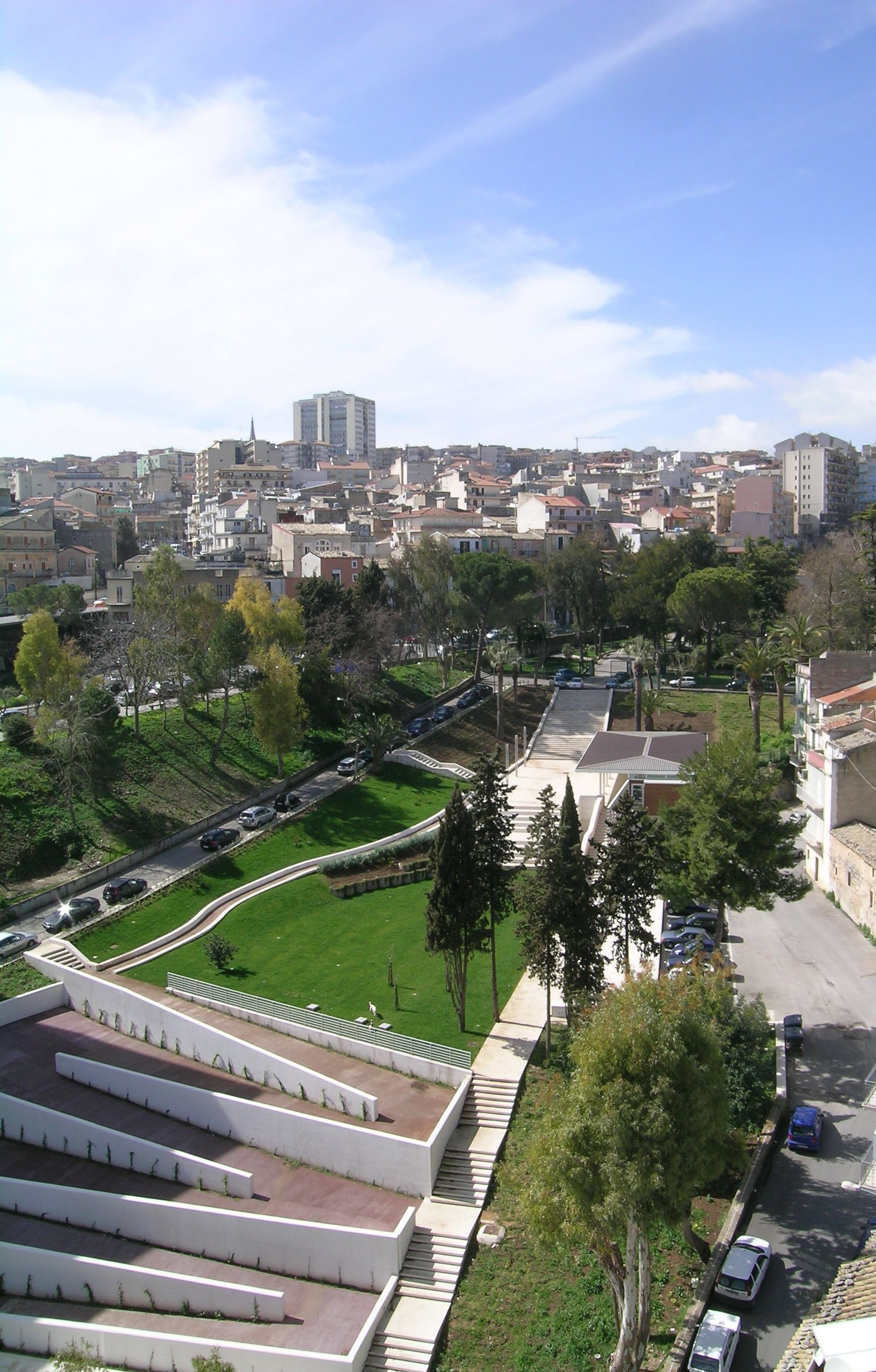 Ingresso di Villa Margherita, Ragusa